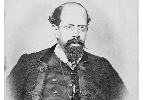 Vicente Florencio Carlos Riva Palacio Guerrero